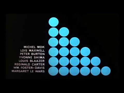 Заставка британского шпионского фильма 1962 года «Доктор Ноу».